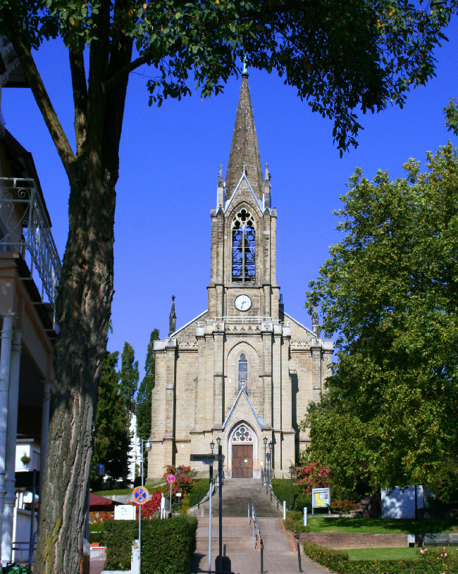 Stadtkirche an der Friedrichstrasse